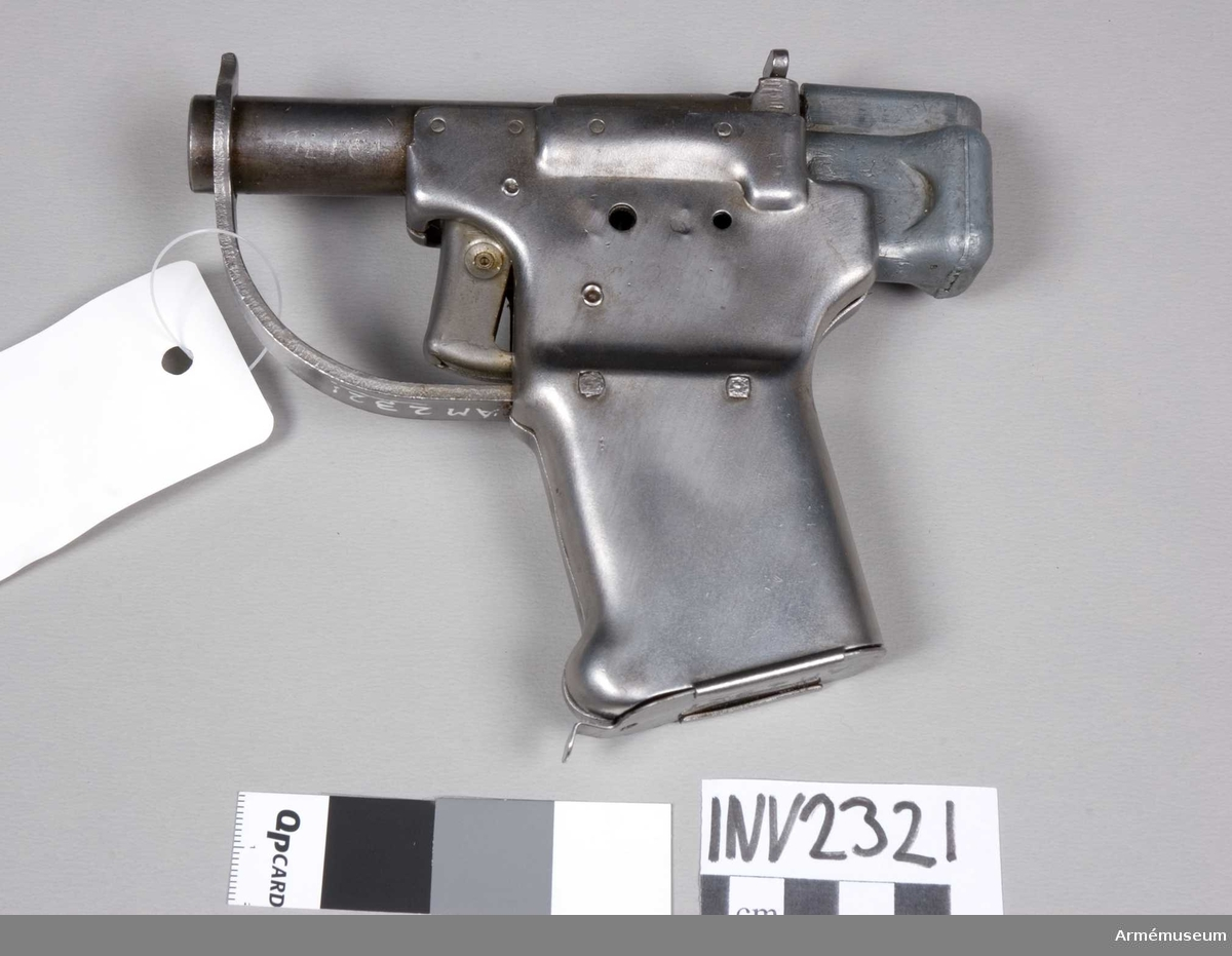 Enkelskotts med förvaring av tio patroner i utrymmet i kolven. Kaliber 45 (11,5 mm). Skjuter patron .45 ACP, lyspatron av samma typ samt en speciell "survival" round (hagelpatron) för jakt.